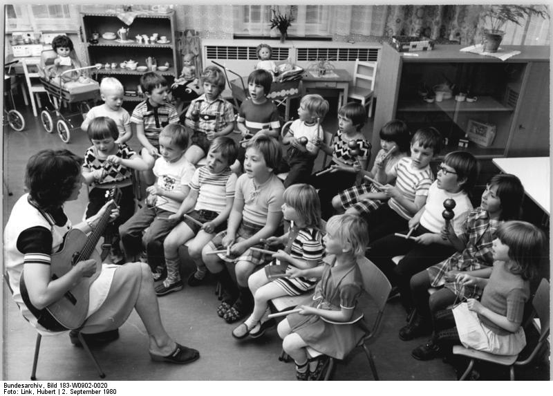 Oppburg, Blick in den Kindergarten ADN-ZB Link sch-02.09.80 Bez. Gera: Im Kindergarten des Dorfes Oppburg werden 60Kinder im Alter zwischen 3 und 6 Jahren liebevoll betreut. Ihre Eltern arbeiten vorwiegend in der LPG-Pflanze- und Tierproduktion. Für den Aufenthalt eines Kindes bezahlen die Eltern 45 Pfennig pro Tag. (siehe 18N-19N-21N)